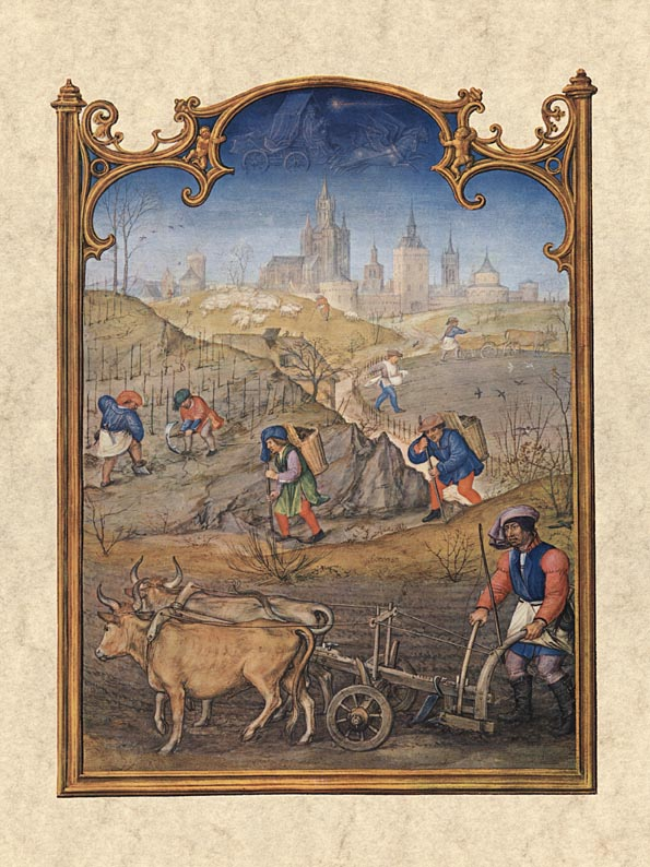 März, Brevarium Grimani, fol. 4v (Flemish)